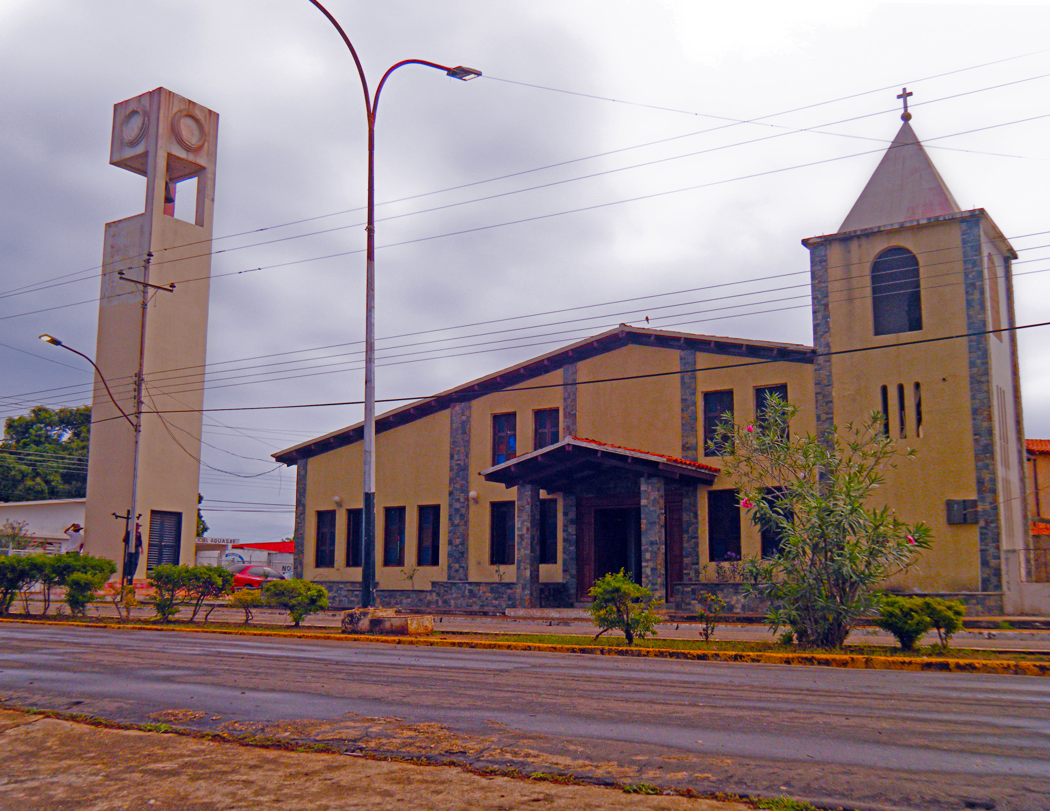 Iglesia San José en Aguasay, Estado Monagas.